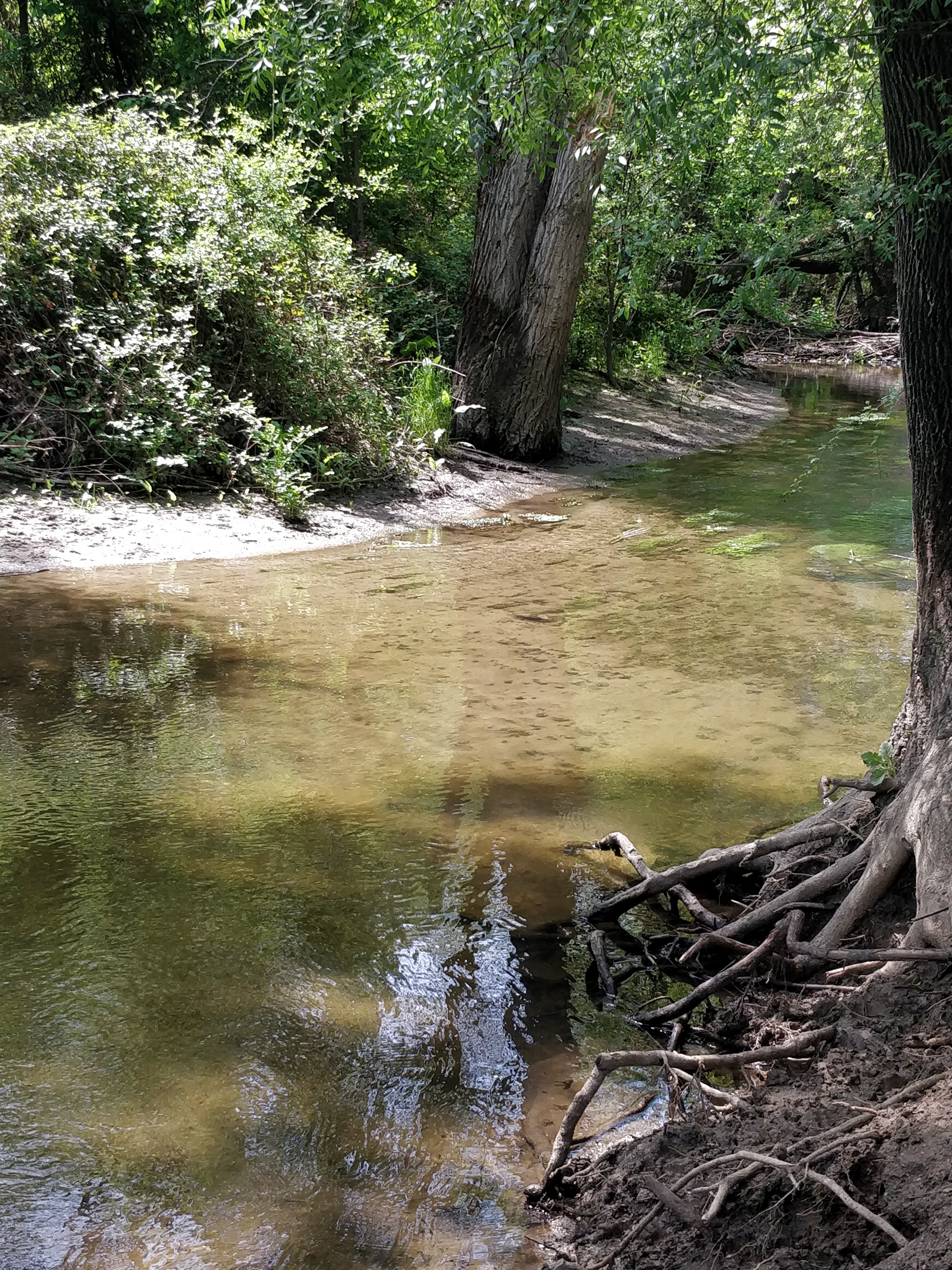 Cuenca del río Guadarrama This is a photography of a Special Area of Conservation in Spain with the ID: ES3110005. Natura2000 entry, EEA entry